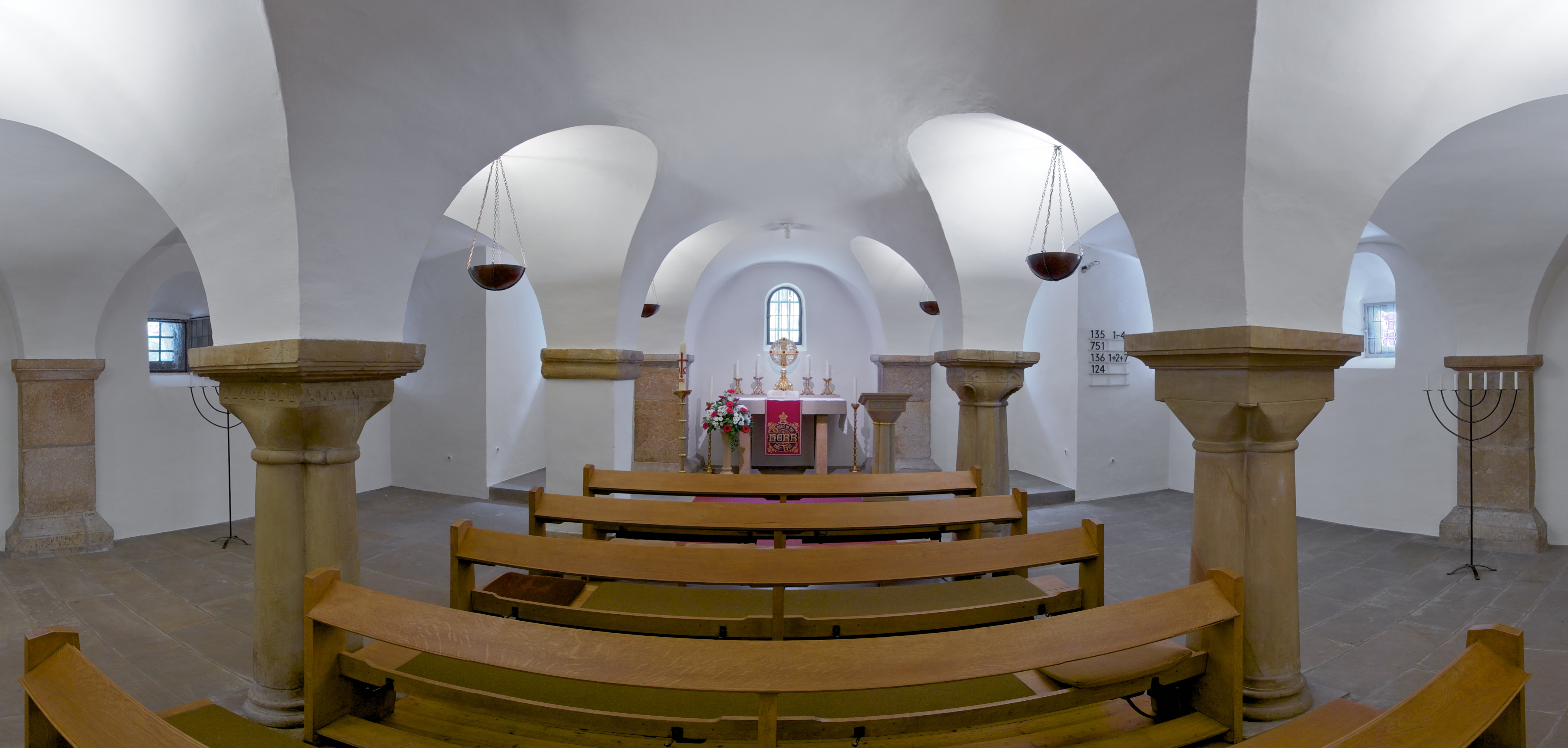 Aufnahme aus der Krypta der Abdinghofkirche in Paderborn